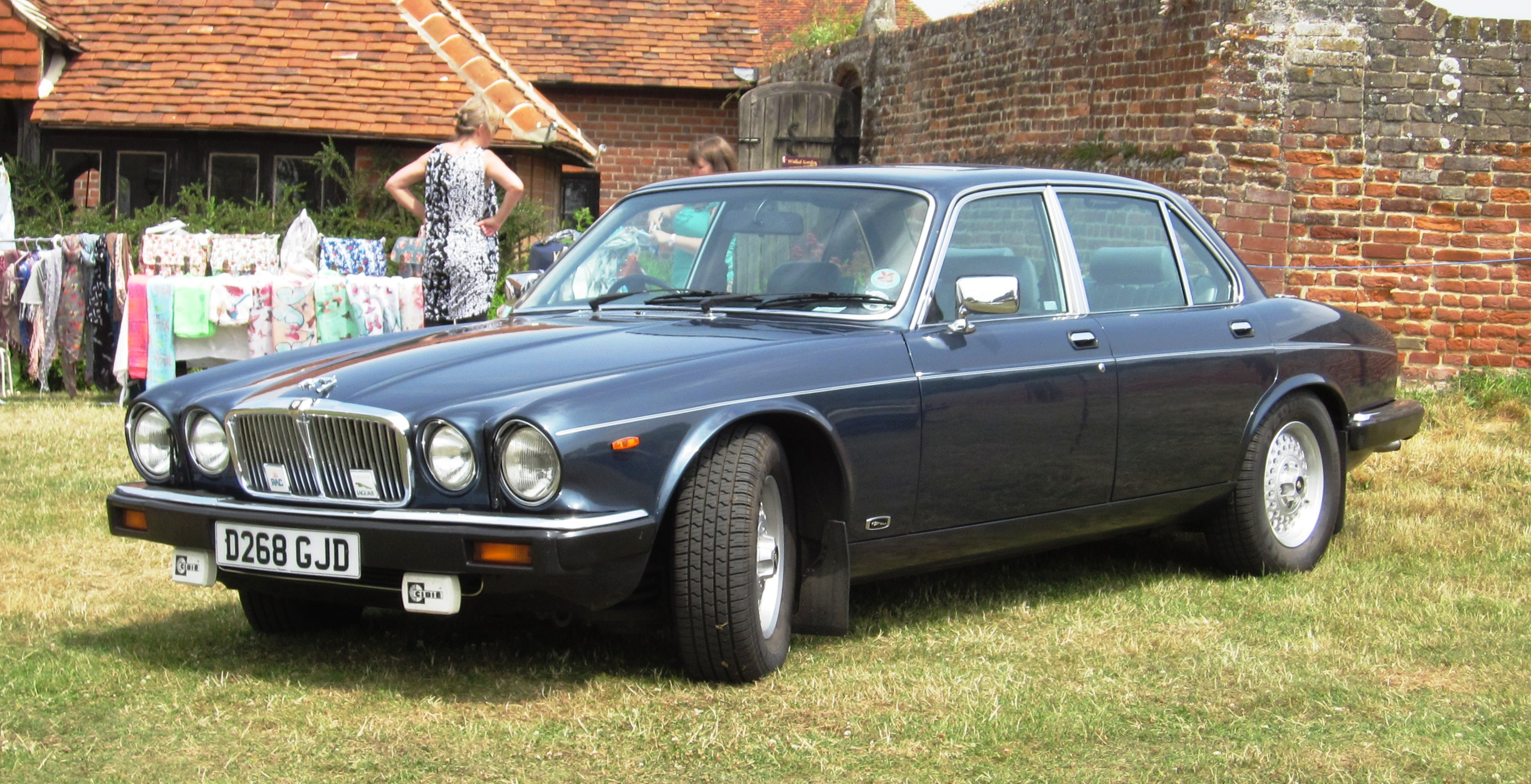 Jaguar XJ12 (1986)